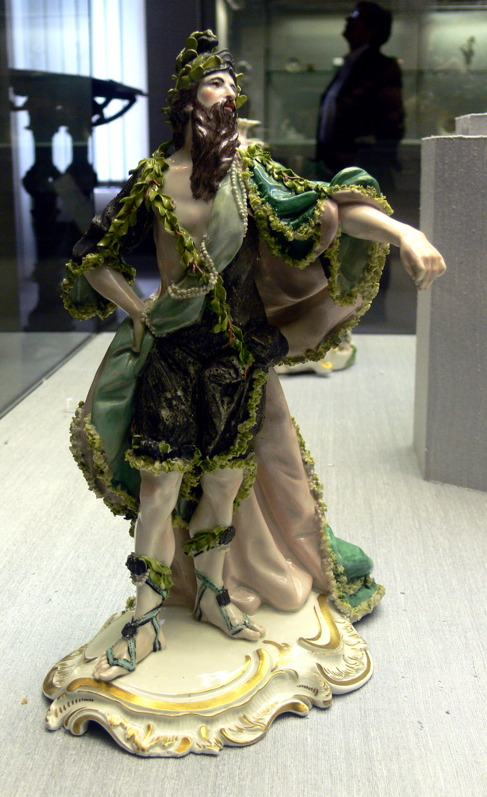 Konrad Linck: Okeanus, Porzellan, Frankenthal um 1765 Kunstgewerbemuseum Berlin, Inv. Nr. HF 480